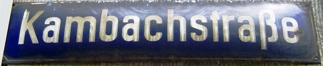 Altes Emaillstraßenschild in Eschweiler-Kinzweiler